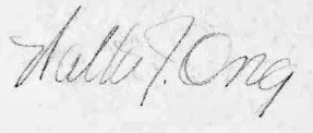 Assinatura do filósofo, historiados, padre e professor Walter J. Ong. Presente no manuscrito de Ramus: método e a decadência do diálogo.